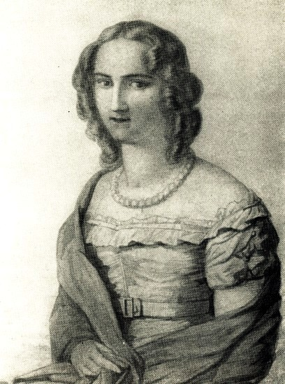 Portrait von Schillers Tochter Emilie von Gleichen-Rußwurm.